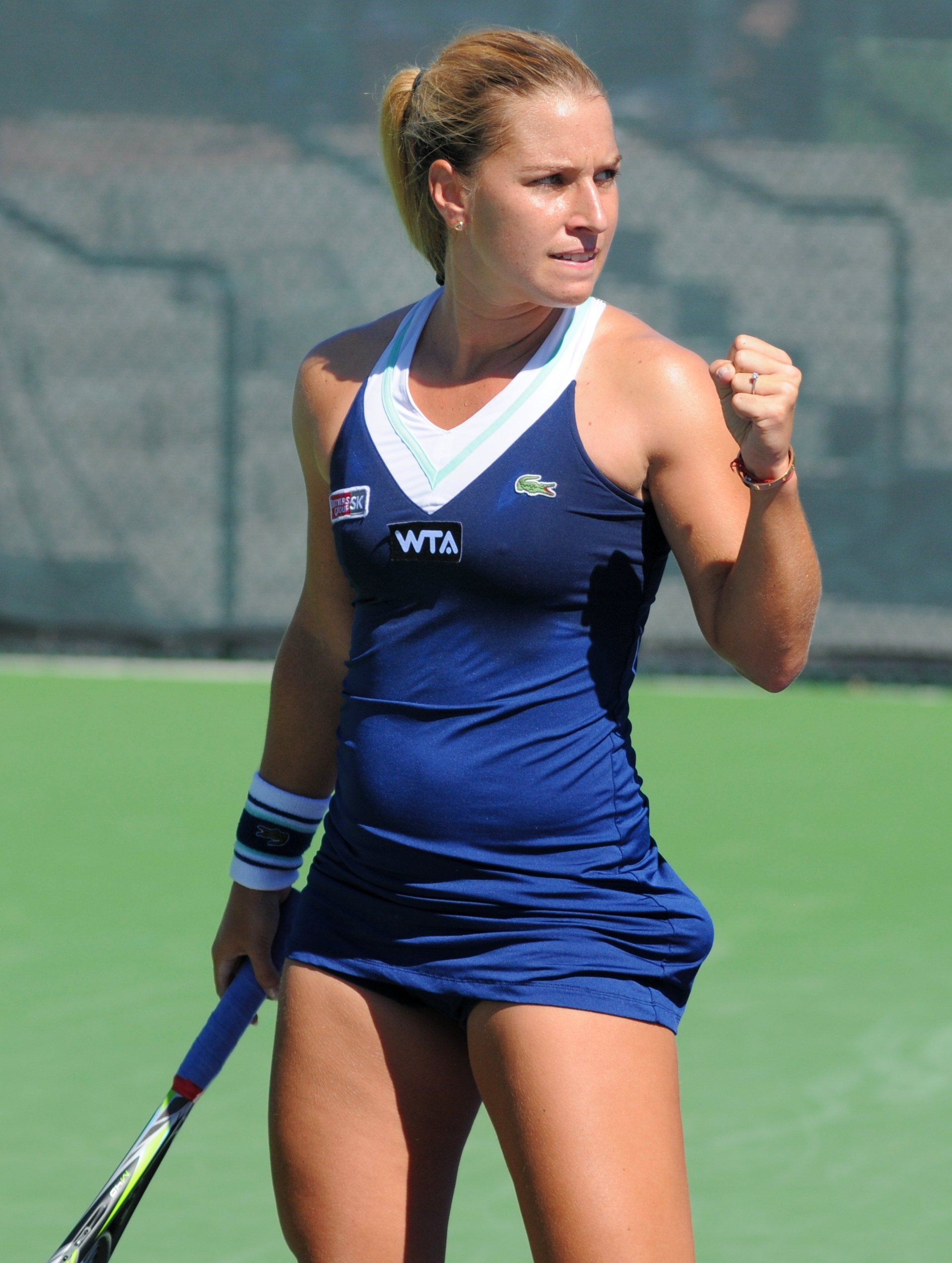 2014 BNP Paribas Open